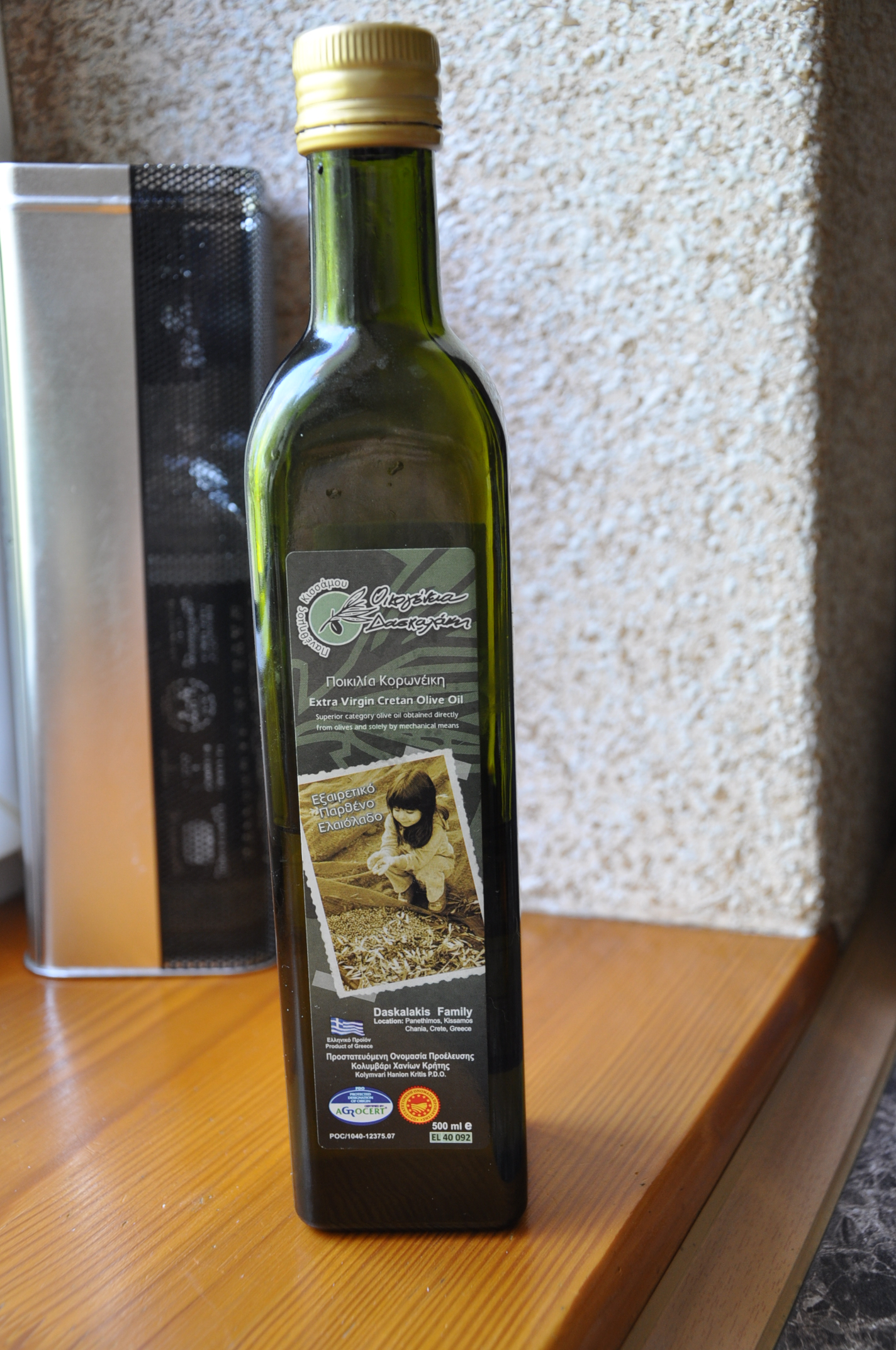 Extra Virgin Cretan Olive Oil. Daskalakis Family, Panethimos, Kissamos Chania. 500ml